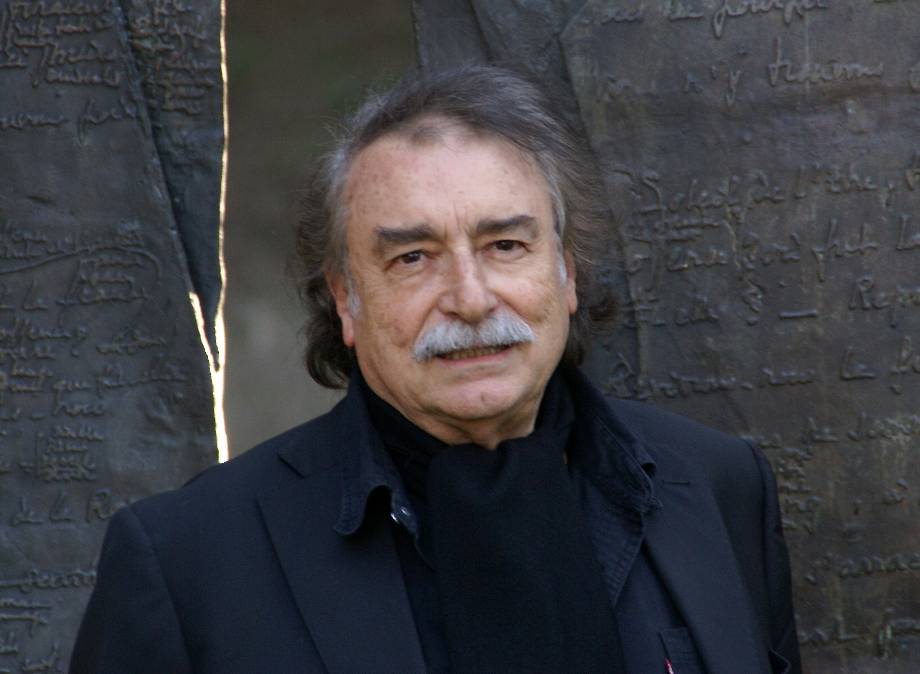 Portrait d'Ignacio Ramonet